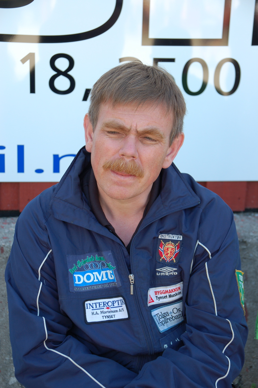 P. E. Oldertrøen, Tynset, skytterkonge 1992